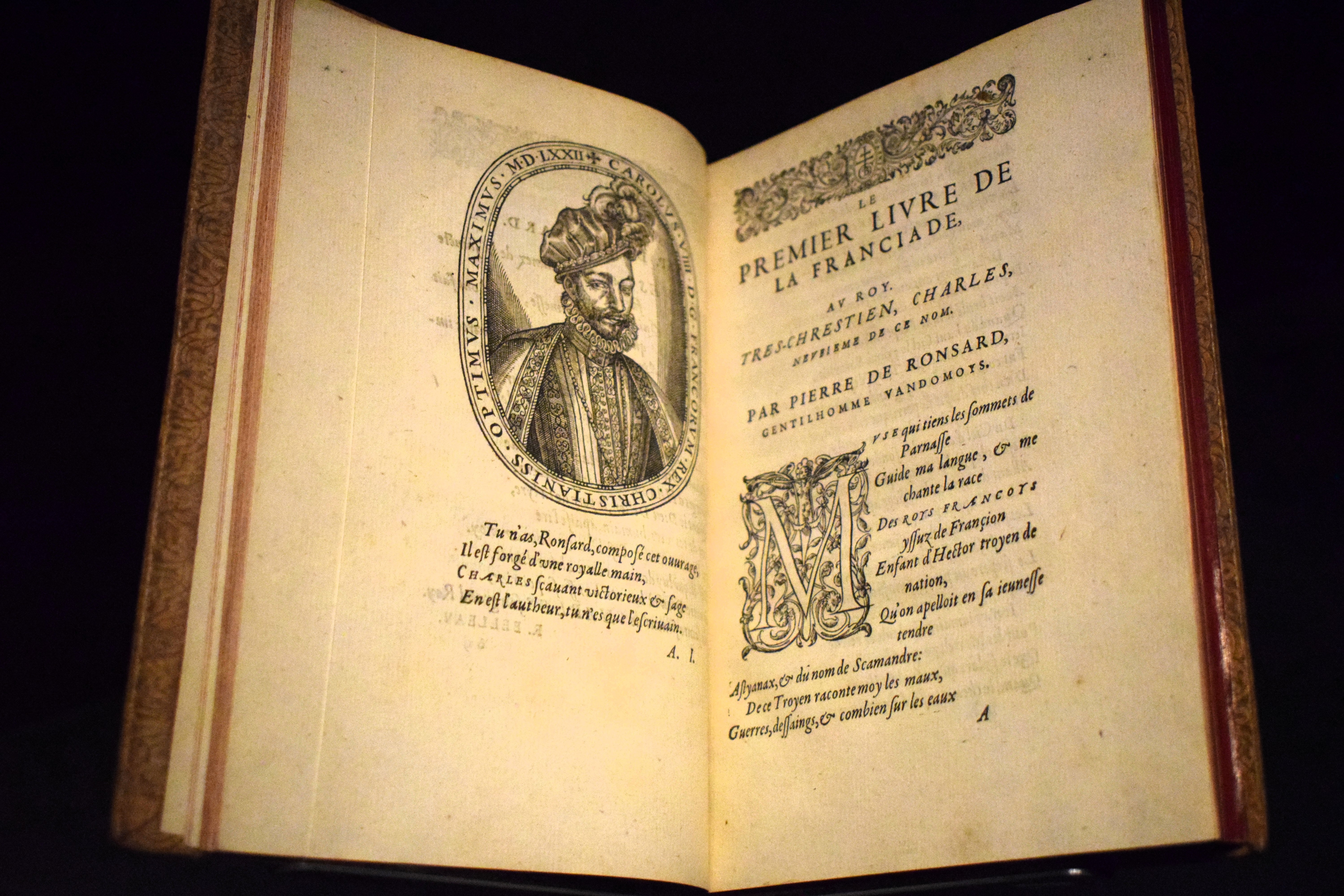 Pierre de Ronsard (1524-1585) « La Franciade » Paris, 1572, édition originale Fondation Martin Bodmer (Suisse)